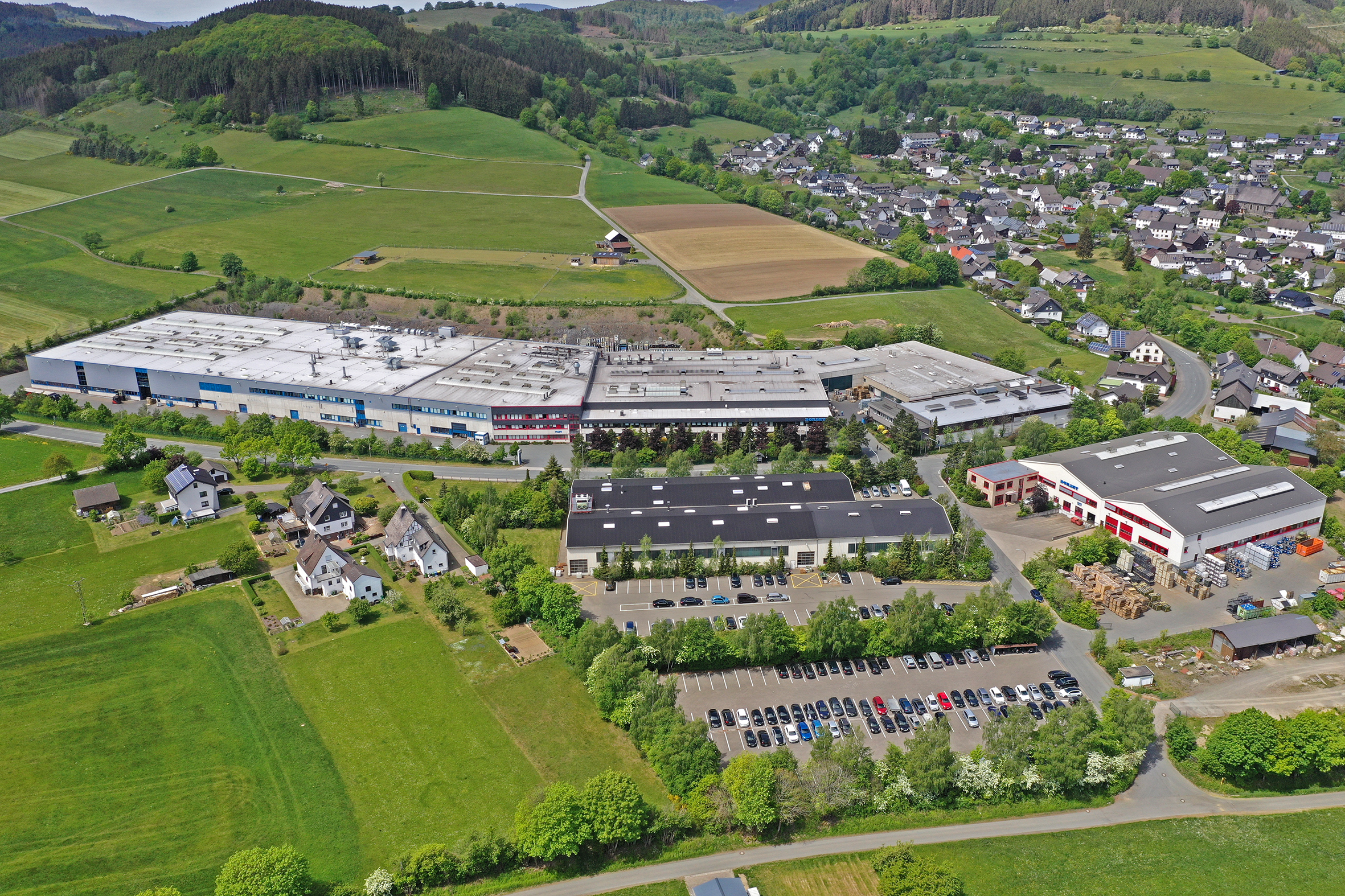 BORBET Hesborn Luftaufnahme